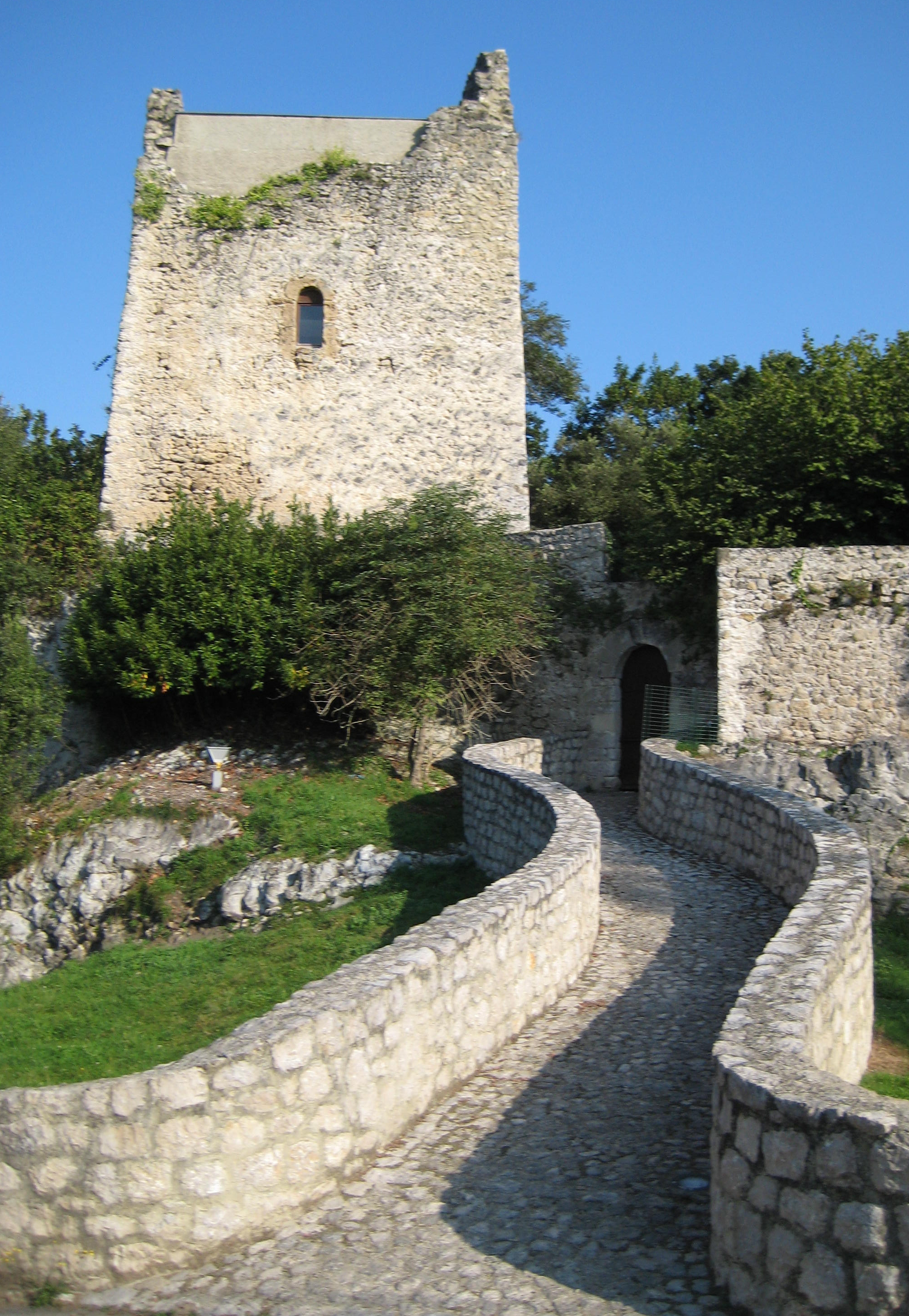 Torre de Estrada, en Estrada, Val de San Vicente, Cantabria, España